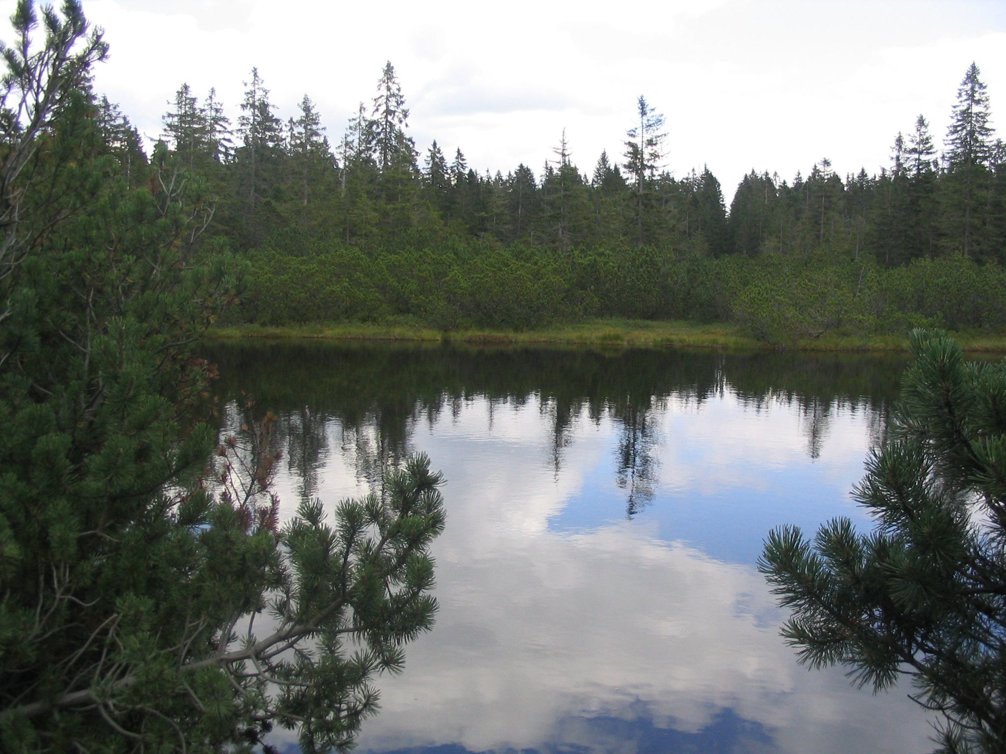 Latschensee im Nationalpark Bayerischer Wald, aufgenommen von Dr. Hagen Graebner am 31.07.2007